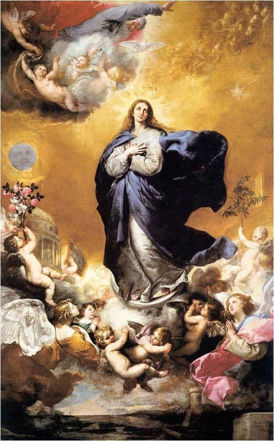 La obra representa la Inmaculada Concepción de la Virgen María, madre de Jesucristo.